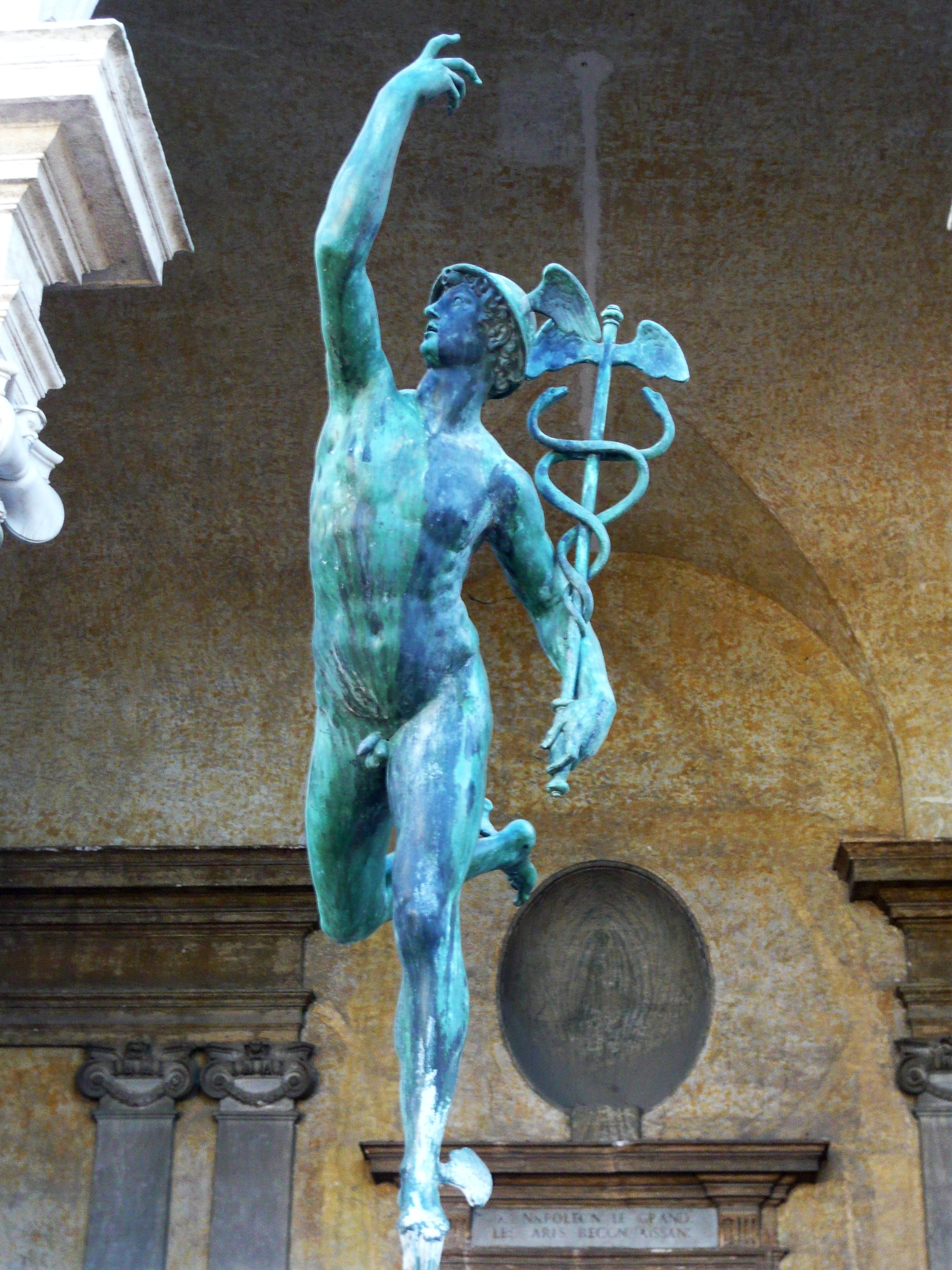 Le mercure. Villa Medicis à Rome